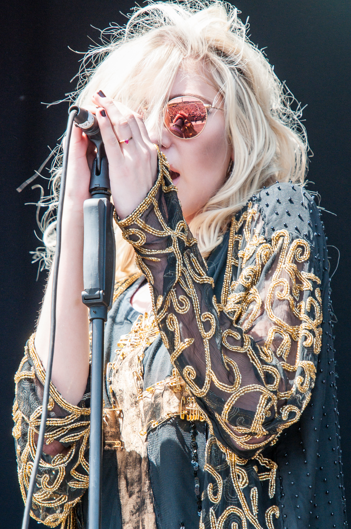 ARGO-Konzerte,Centerstage,Konzert,Livekonzert,Livemusik,Musik,RiP,Rock im Park 2014,Taylor Momsen,The Pretty Reckless